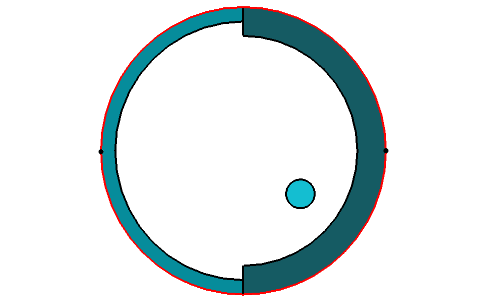 Figure illustrant l'axiome de séparation toplogique dit T2et1/2